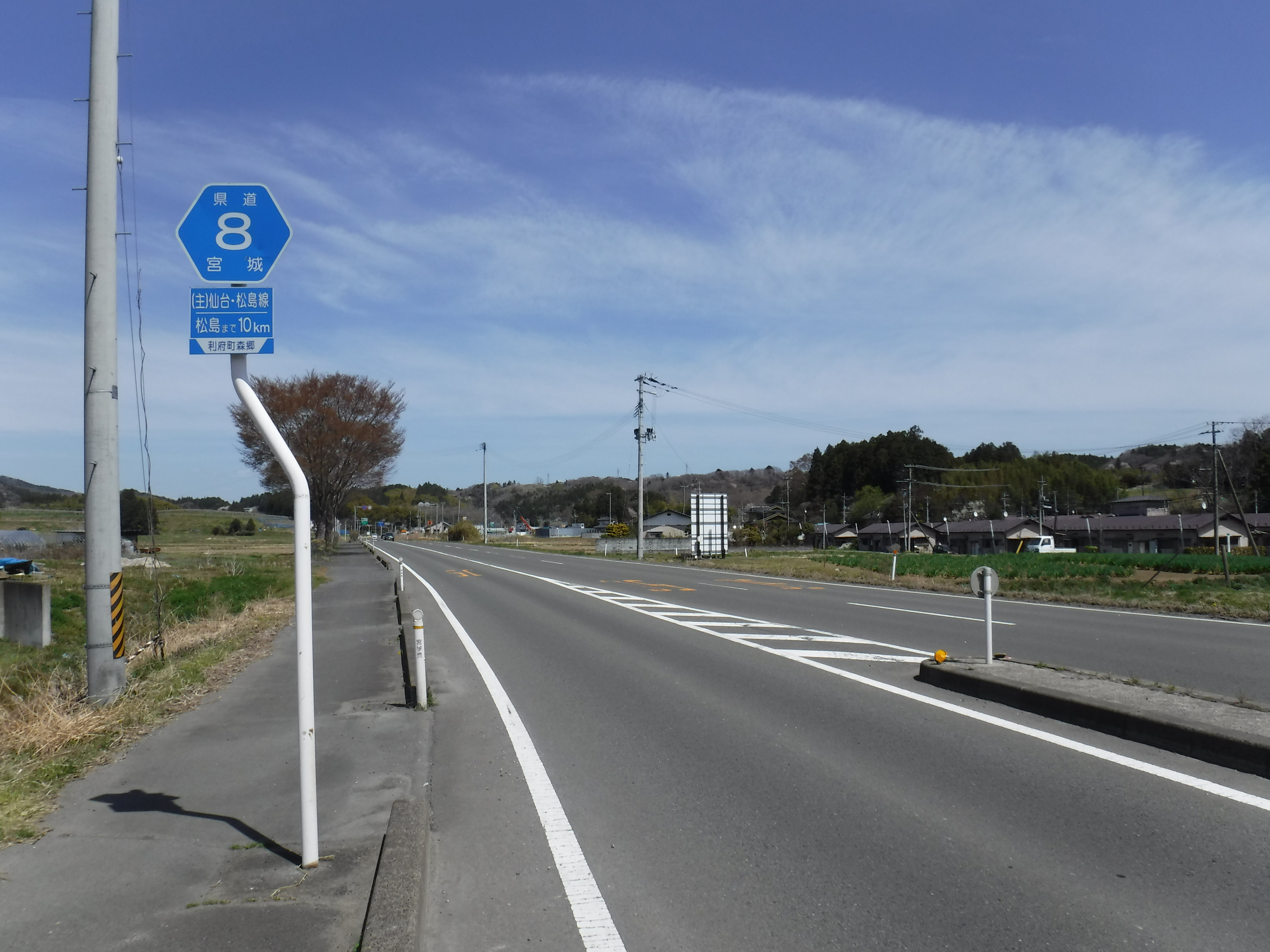 宮城県道8号線利府町森郷付近（塩釜方面を撮影）